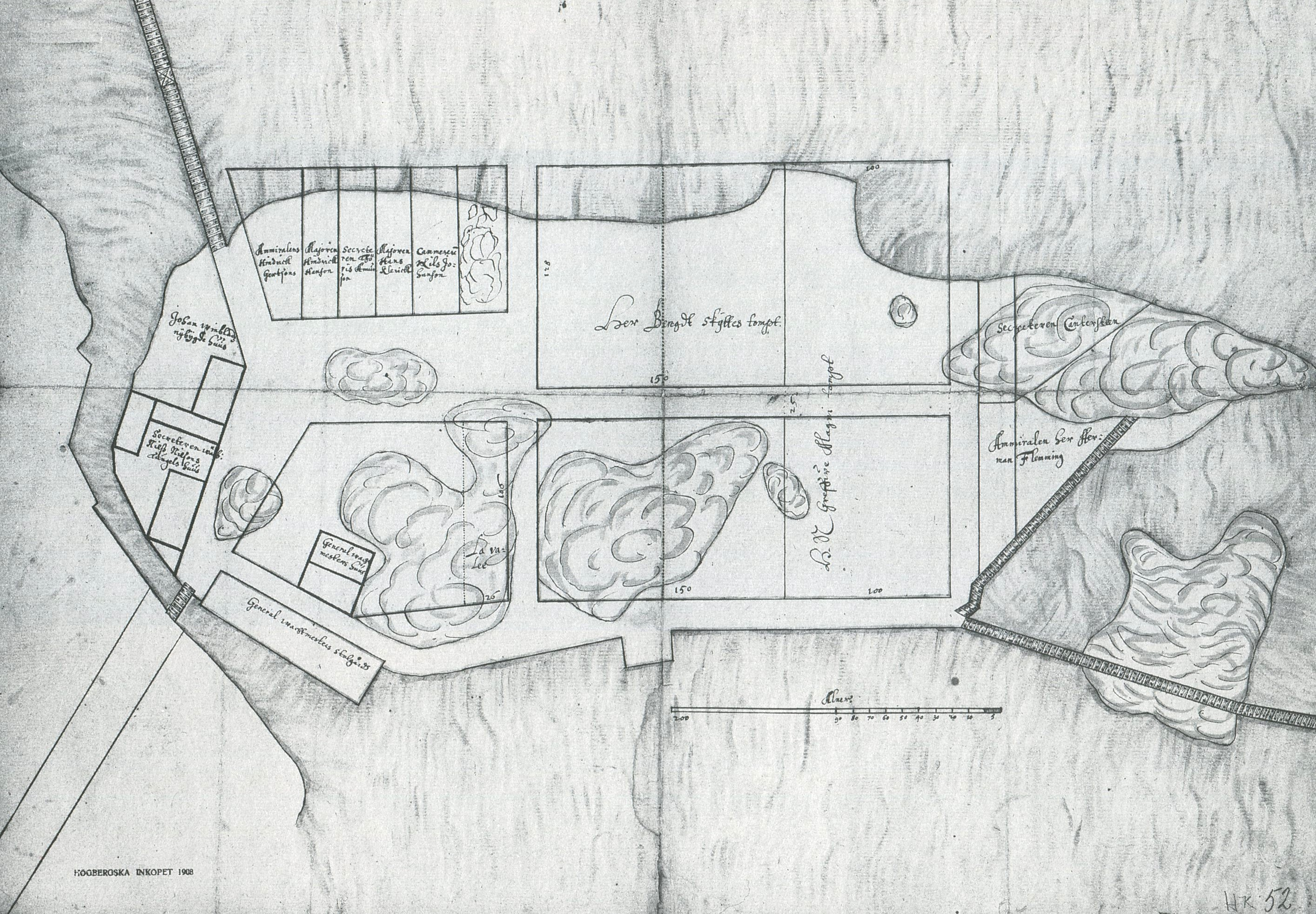 Karta över Blasieholmen "gamble Skepzholmen" med ny tomtindelning